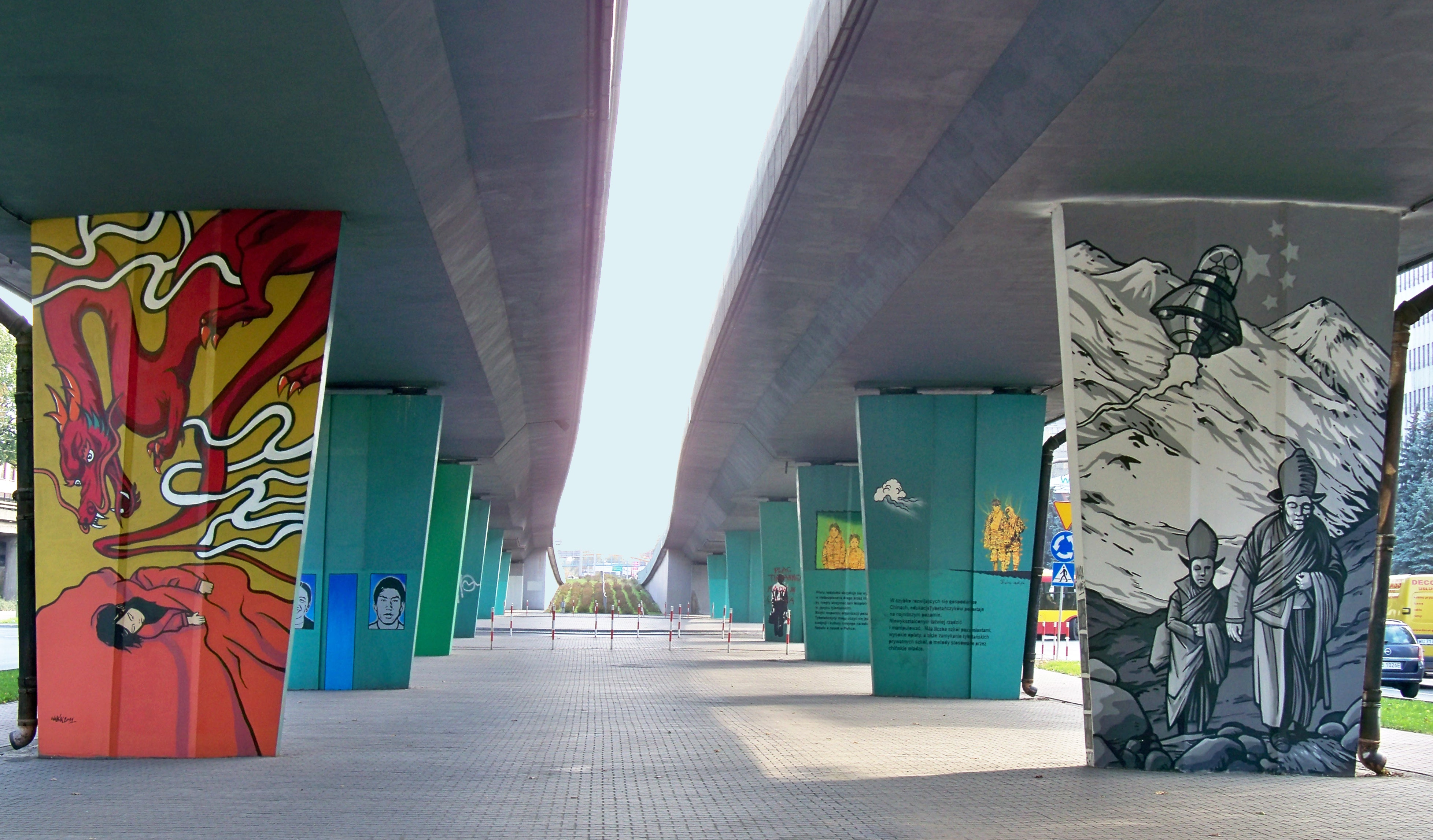 Galeria Tybetańska. Zespół murali wzdłuż al. Prymasa Tysiąclecia w Warszawie. Większość na filarach estakady nad rondem Tybetu. Pierwszy po lewej: Dagmara Matuszak, Artur Wabik - "Sen". Pierwszy po prawej Inwazja - "Uwaga Inwazja"